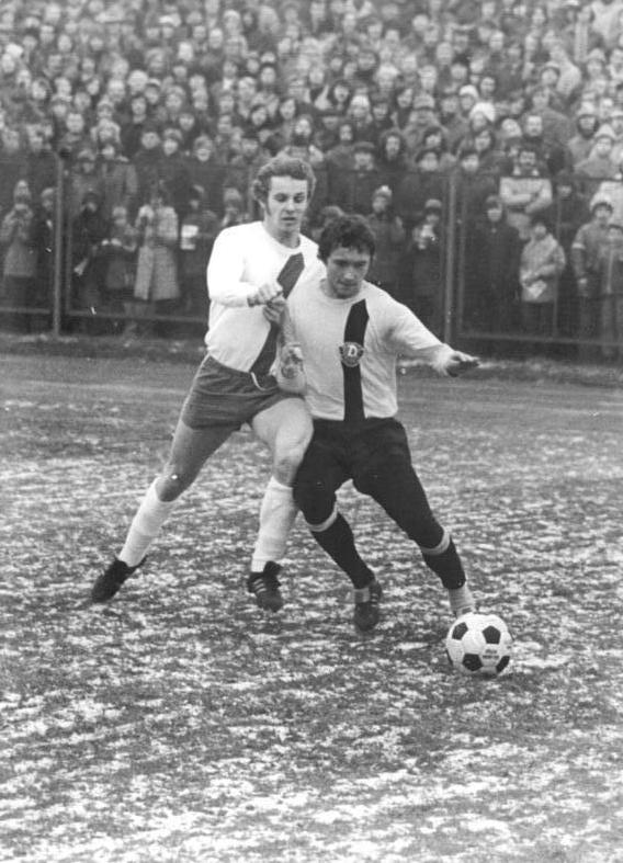 ADN-ZB-Kluge- -20.12.75-str-Leipzig: Fußball-Oberliga 1. FC Lok Leipzig - SG Dynamo Dresden 0:2- Zwei Nationalspieler und Verteidiger im Duell: Joachim Fritsche vom 1. FC Lok Leipzig (l.) und Gerd Weber von der SG Dynamo Dresden. Durch den Auswärtssieg sicherten sich die Dresdener vor 26 000 Zuschauern am 20.12. den inoffiziellen Titel eines Herbstmeisters der Oberligasaison 1975-76.